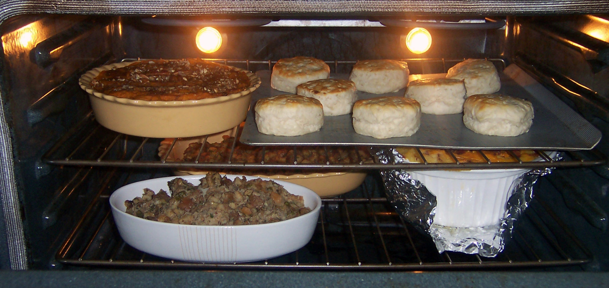 Thanksgiving oven